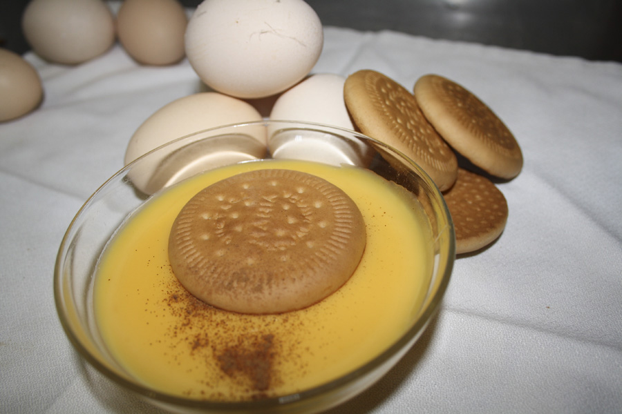 Natillas caseras con galletas. Foto realizada en Venta Aurelio. Restaurante en Chipiona. Cádiz